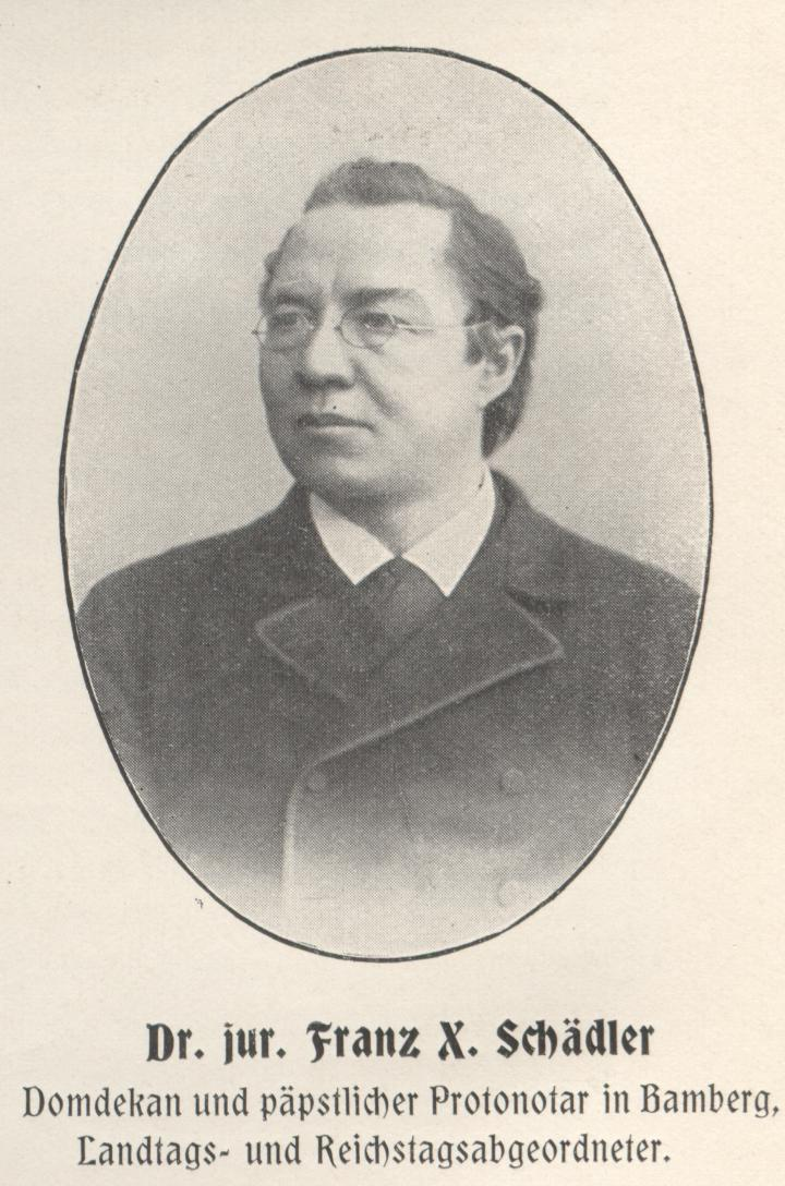 Franz Xaver Schädler, Priester, Reichstagsabgeordneter